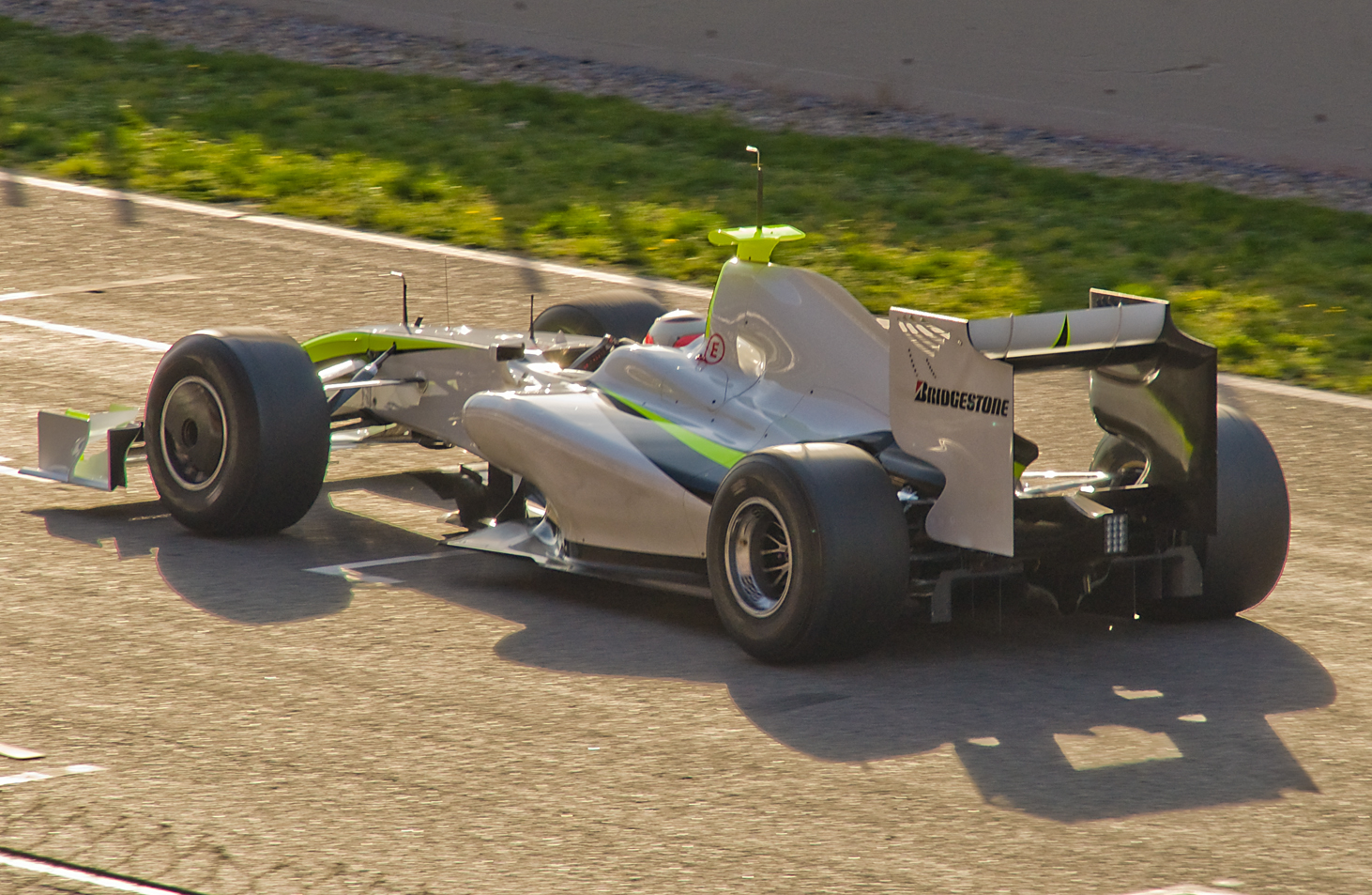 Nikon D90 + Sigma 18-200 DC OS HSM 1/320s - F/13 - 200mm - ISO400